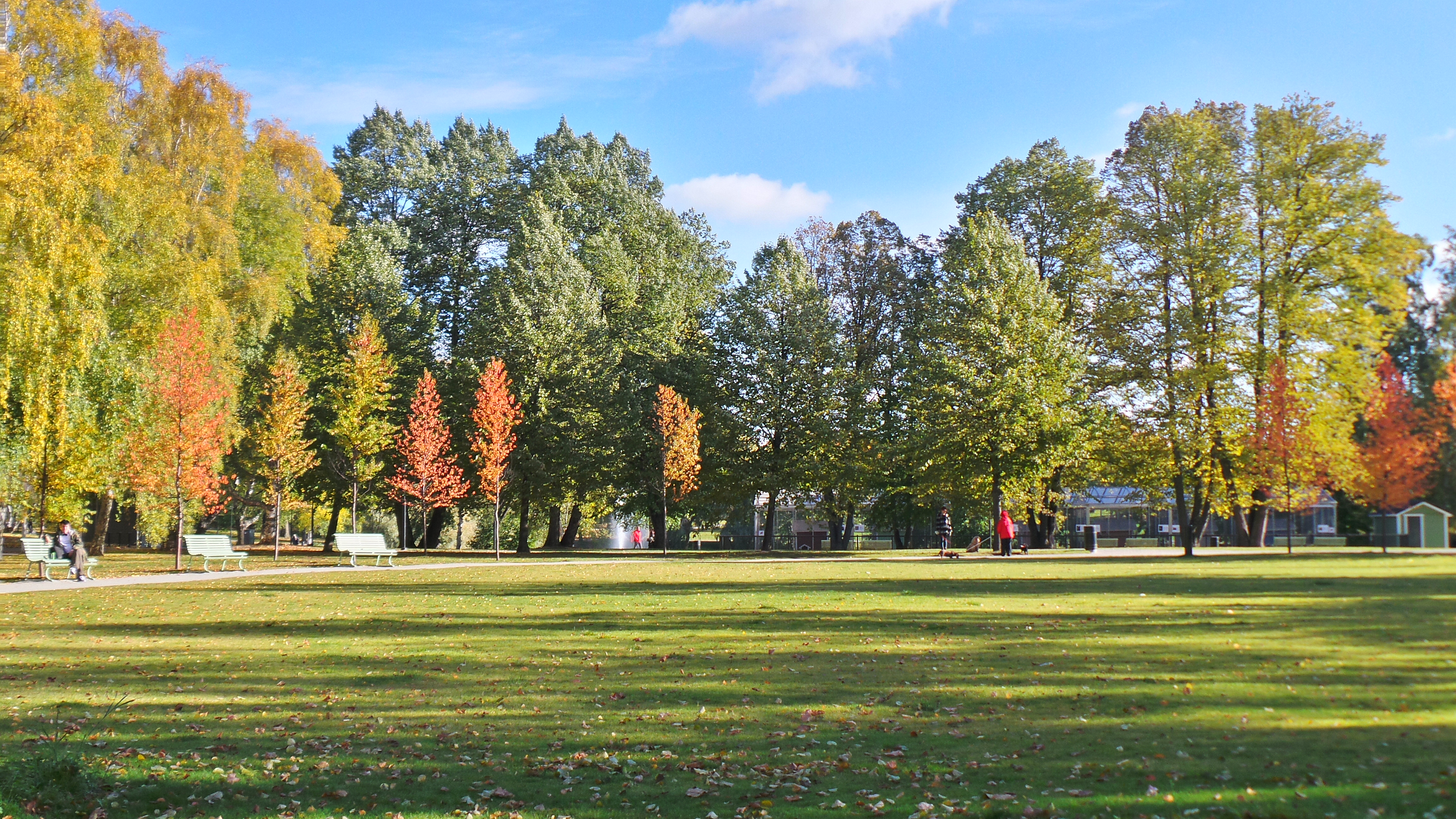 Sorsapuisto